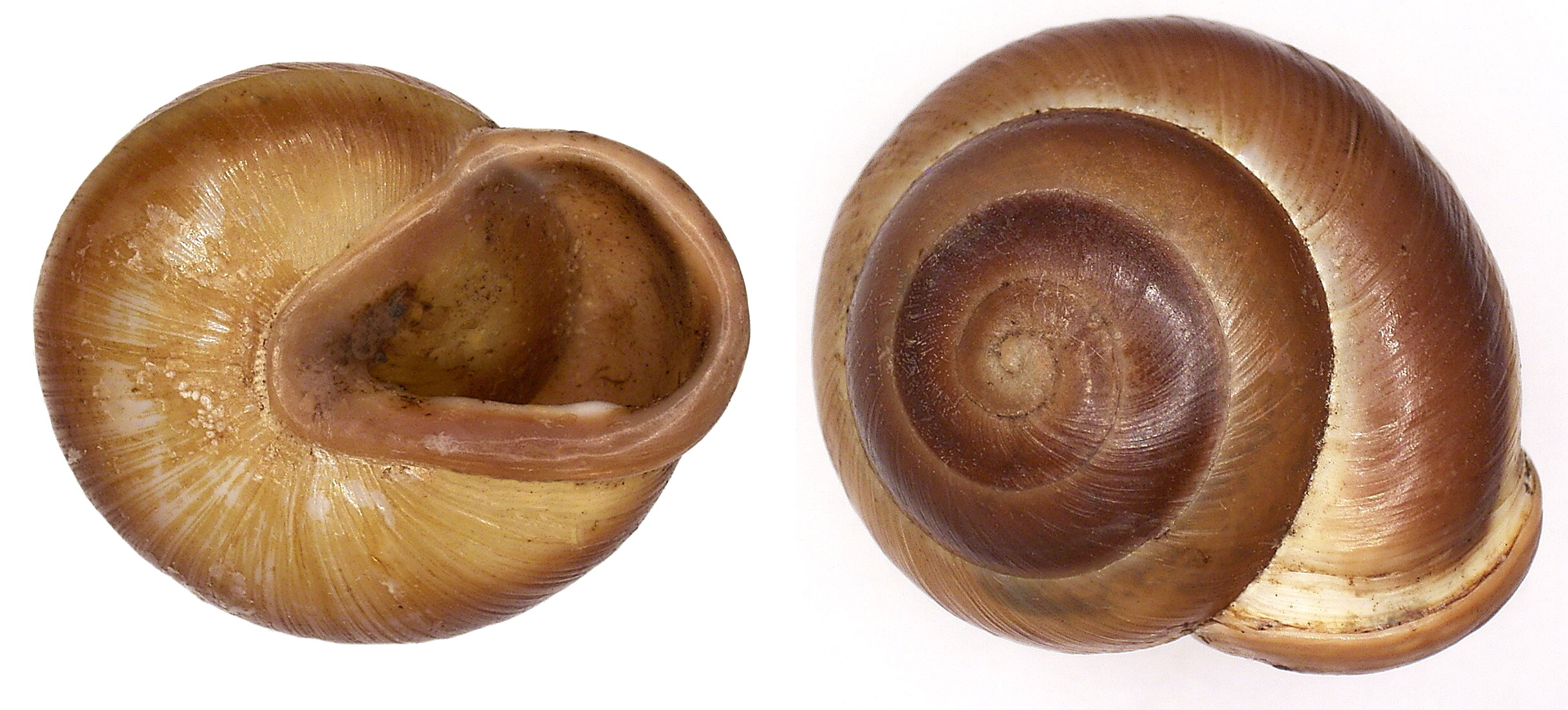 Familie: Camaenidae Groesse: 25 mm Verbreitung: Karibik, Barbados Photo: U.Schmidt, 2006